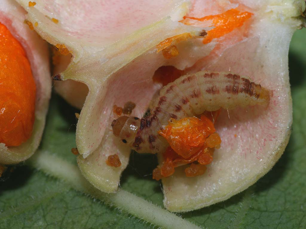 Exemplar found: Russia, Moscow Oblast, Serebryano-Prudsky District, near village Lishnyagi, 07.08.2012, in European spindle (Euonymus europaeus) fruits, days МО, Серебряно-Прудский р-н, окрестности деревни Лишняги, 07.08.2012, в плодах бересклета европейского, днём